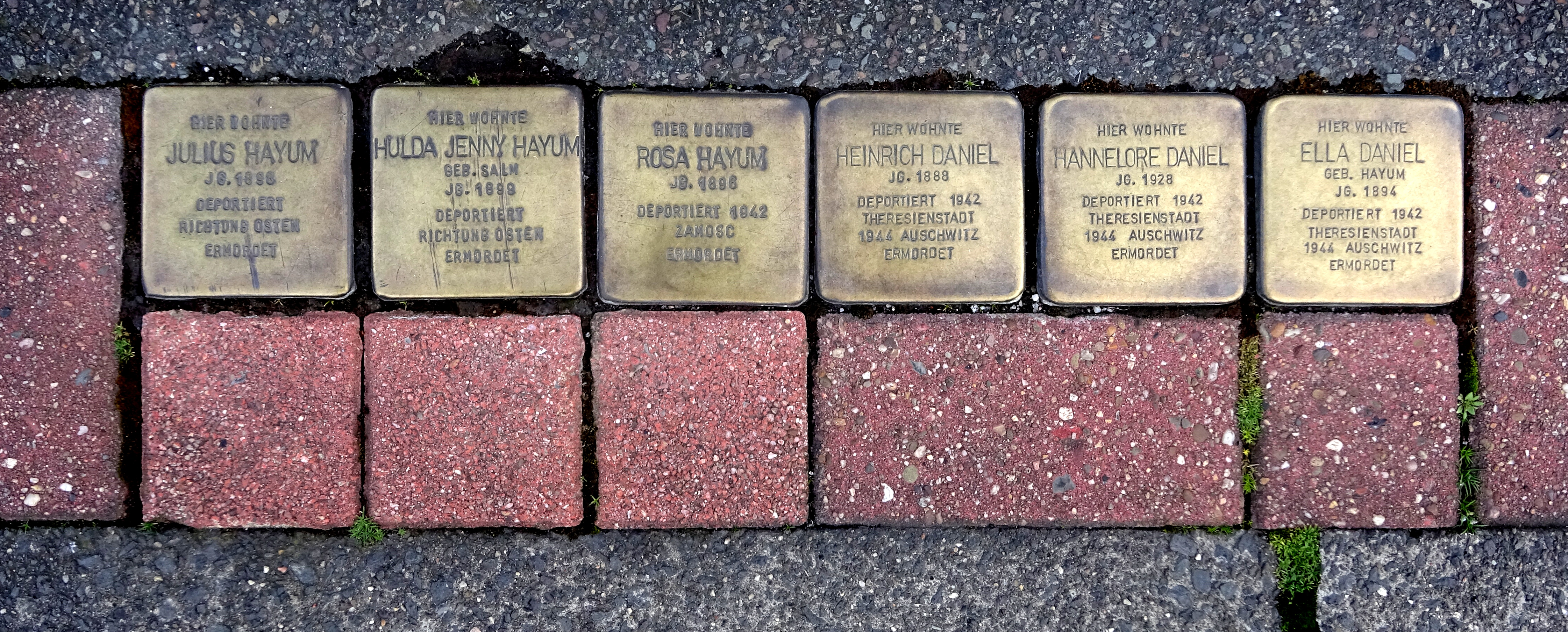 Stolpersteine in Dortmund, Heckelbeckstraße 1